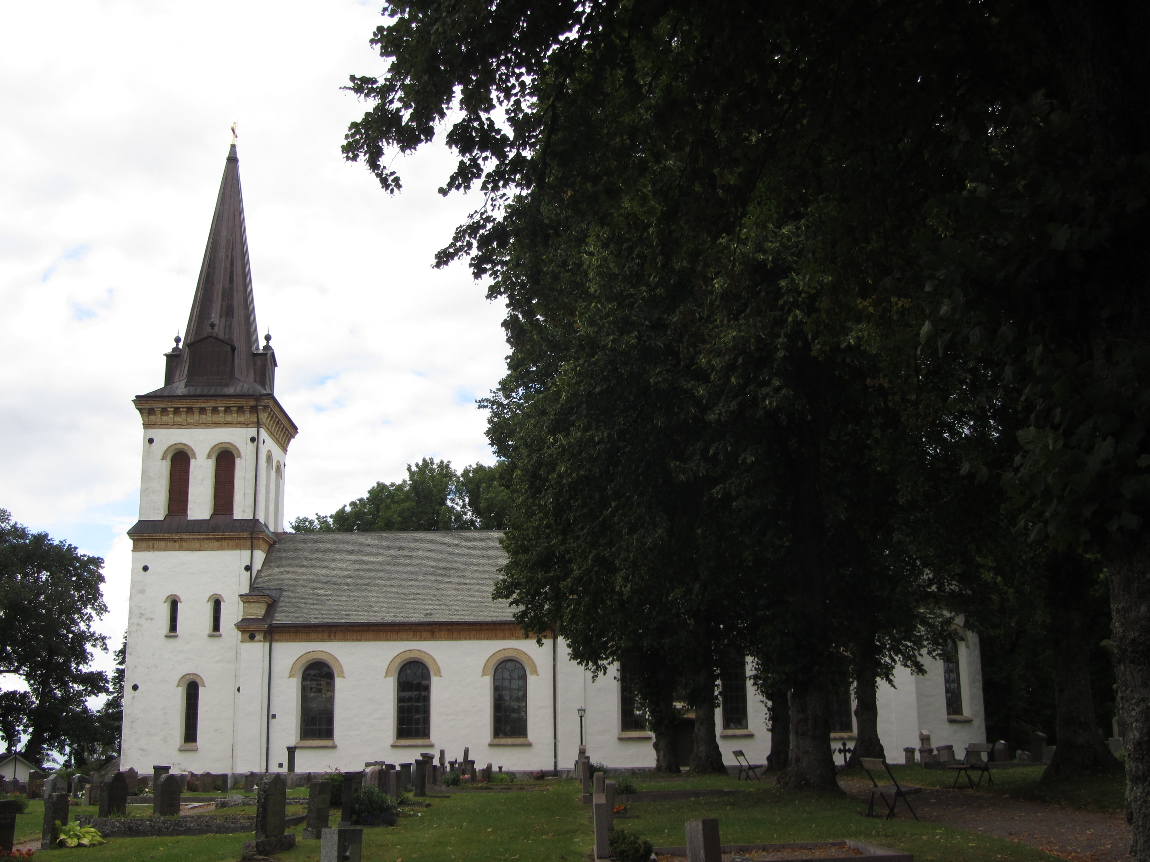 Norra Vånga kyrka i Skånings härad och sydväst om Skara i norra Västergötland.